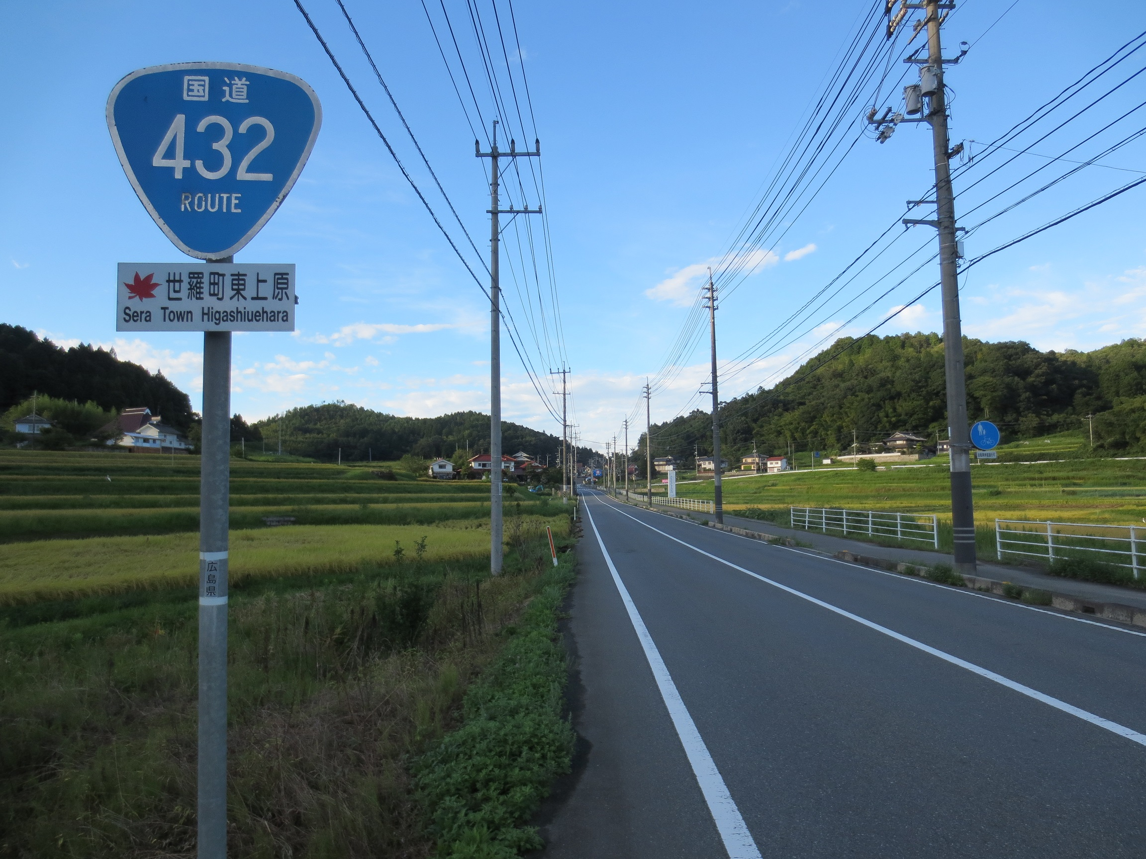 世羅町東上原付近の国道432号。